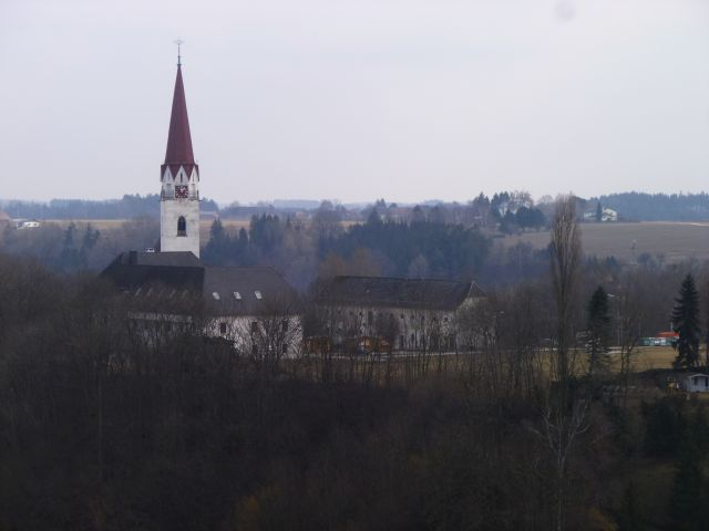 Marienwarte-Aussicht zur Pfarrkirche Thalheim